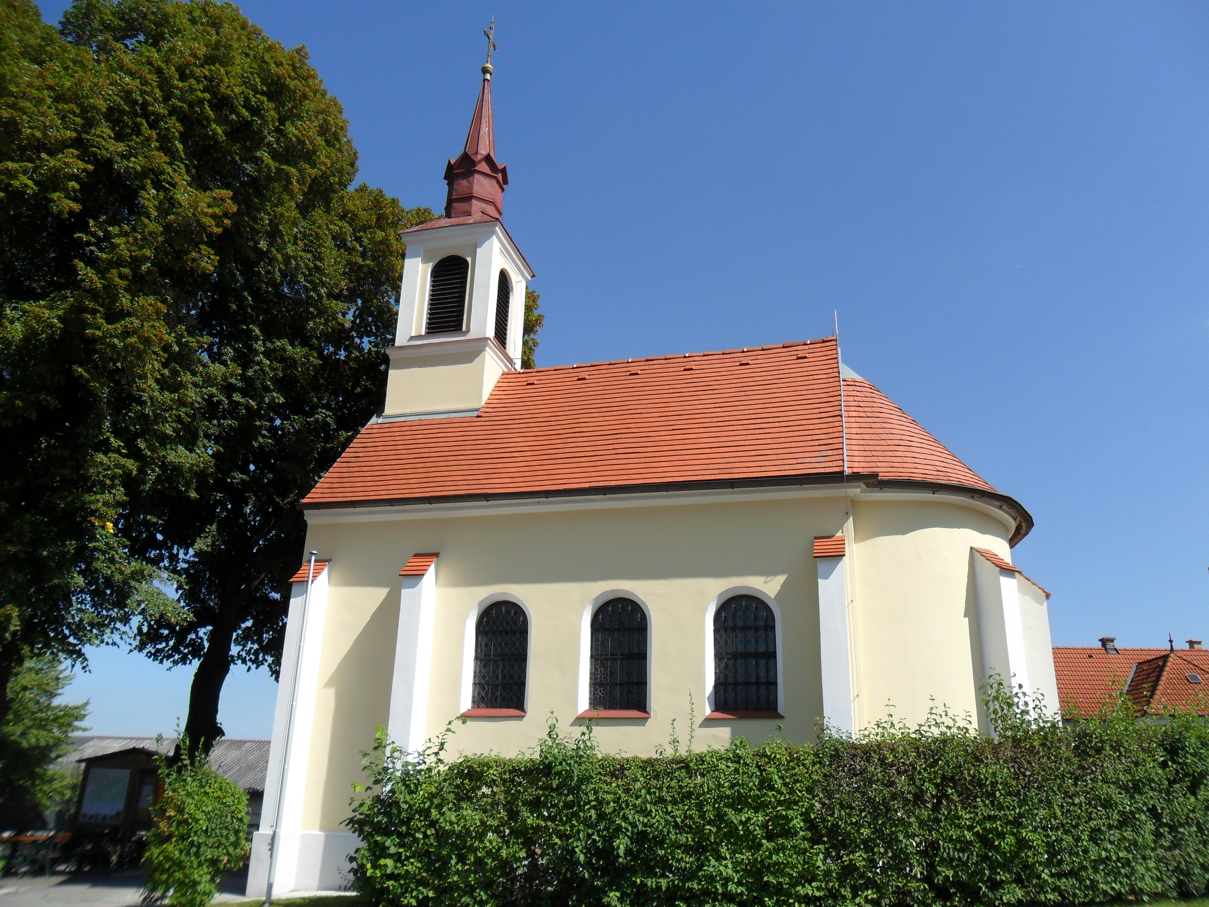 Kath. Filialkirche hl. Florian in Köttlach (Gemeinde Enzenreith)